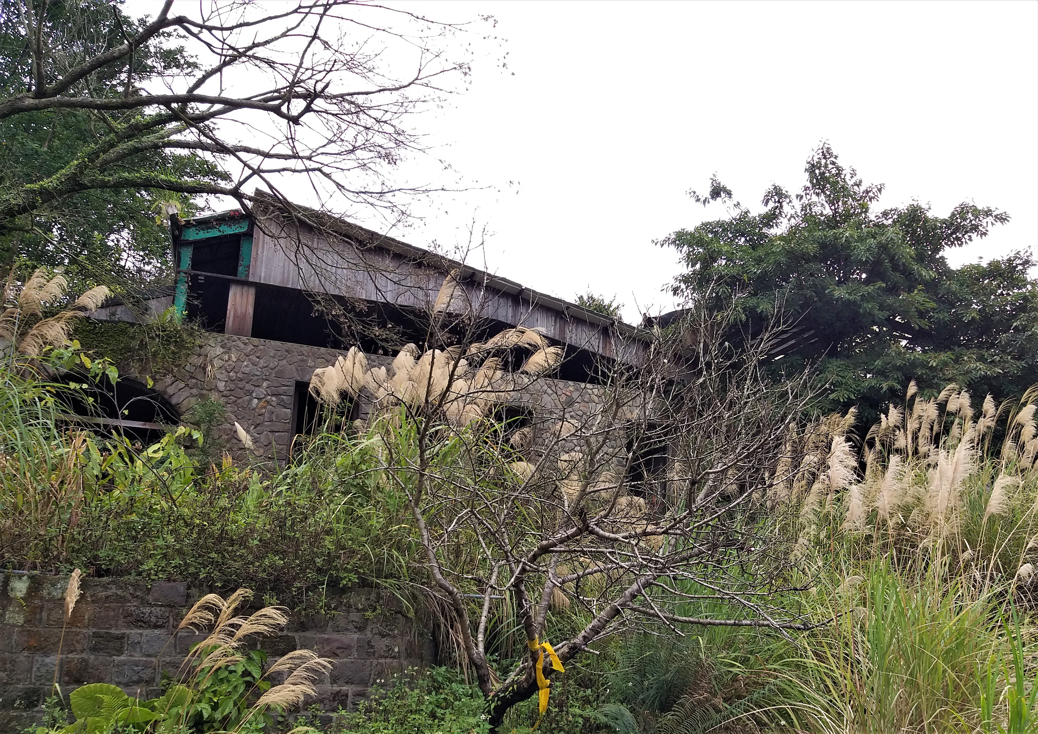 原巴旅館澡堂:逸園溫泉會館於1924年興建，原名「巴」旅館，由淡水忠寮燕樓派名師承建，為溫泉建築之代表，帶動草山溫泉浴之風潮。石造八角型公共浴池，以安山岩石牆、牛頭窗通氣孔具特色，屋架及塔頂通風木構屋架，在造型上甚為典雅。 0888359,121.5257951